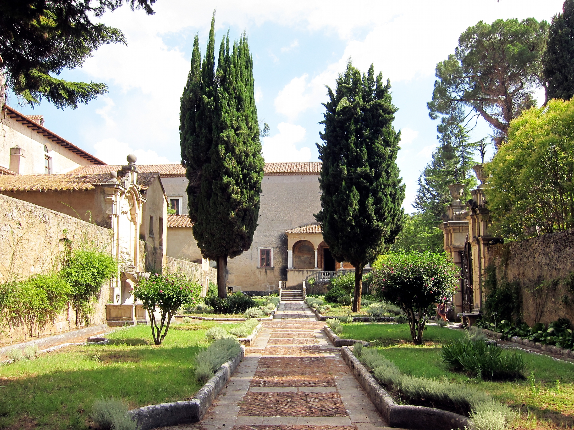 Le jardin du prieur de la Certosa di San Lorenzo (Padula).